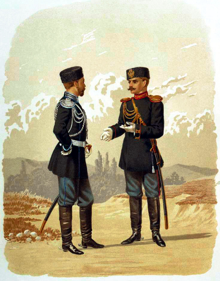 Корпус Военных Топографов и Корпус Фельдегерьский. Обер-Офицеры ( в парадной форме ) ( прик. по воен. вед. 1881 г. № 313 )